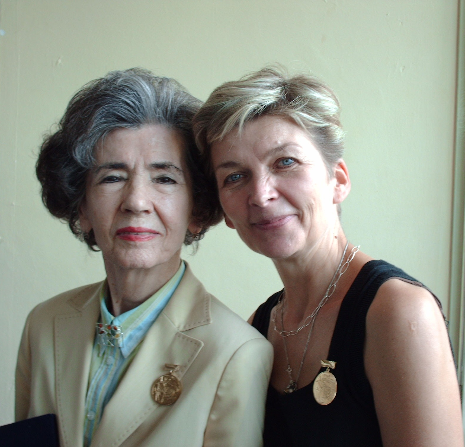 Nina Novak, bailarina, maestra y coreógrafa de ballet polaca. Ruta Butviliene, bailarina, maestra y coreógrafa de ballet lituana.